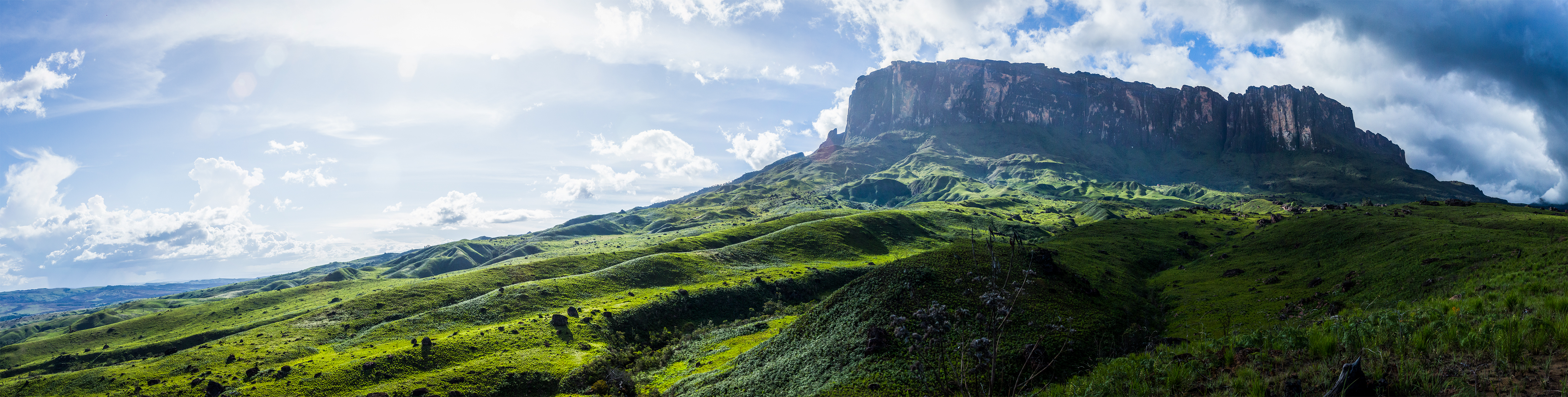 Kukenan Tepuy